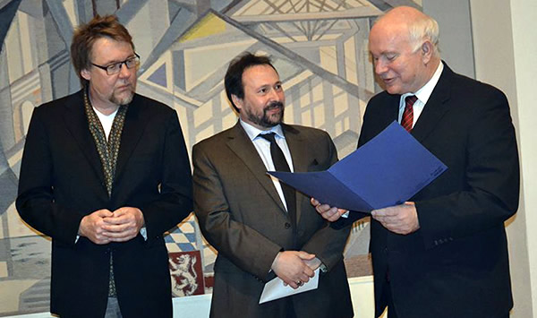 Klaus Wolfgang Wildner mit Hermann Hauser und Landrat Heinrich Trapp bei der Verleihung des Kulturpreises des Landkreises Dingolfing-Landau 2013